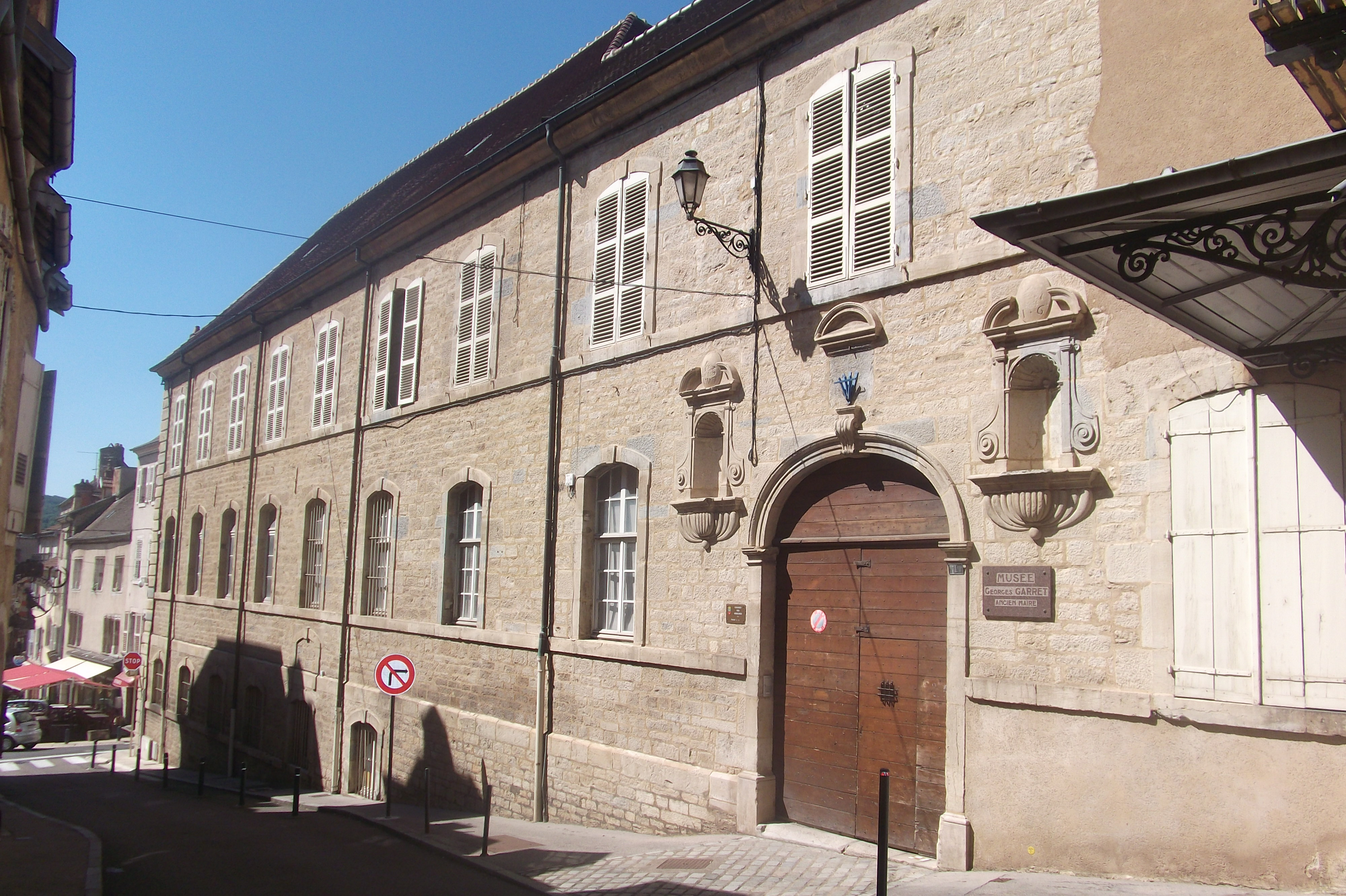 Le musée Georges-Garret de Vesoul (Haute-Saône, Franche-Comté)